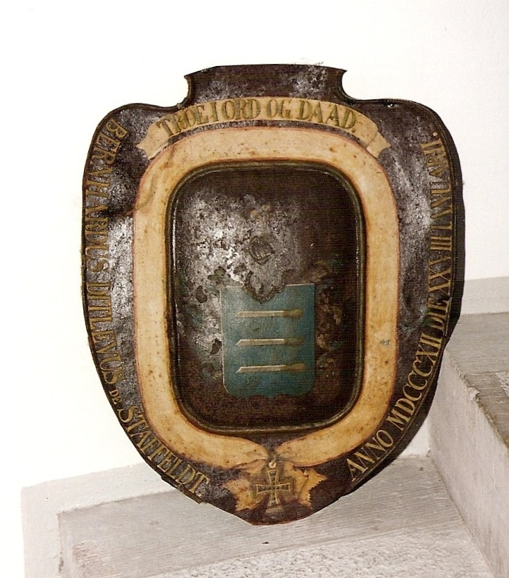 Tilhørende generalmajor Bernhard Ditlev v. Staffeldt, f. 1753, d. 1818. Bannertekst: ”TROE I ORD OG DAAD”.